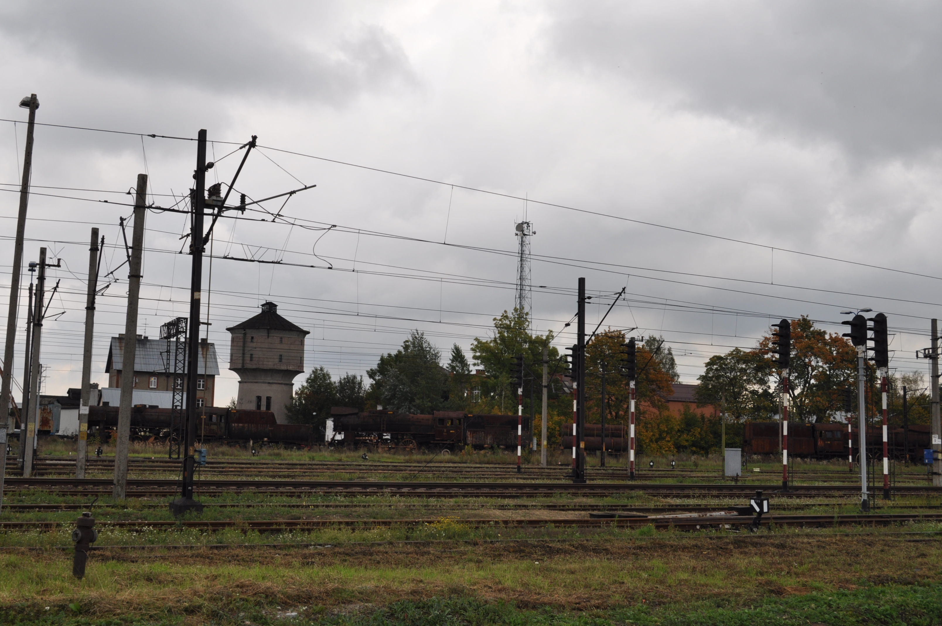 Widok na zabytkowe lokomotywy i wieżę ciśnień